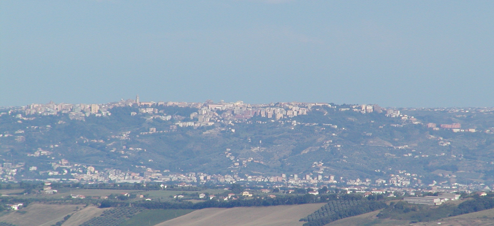 Die Stadt Chieti aus der Ferne